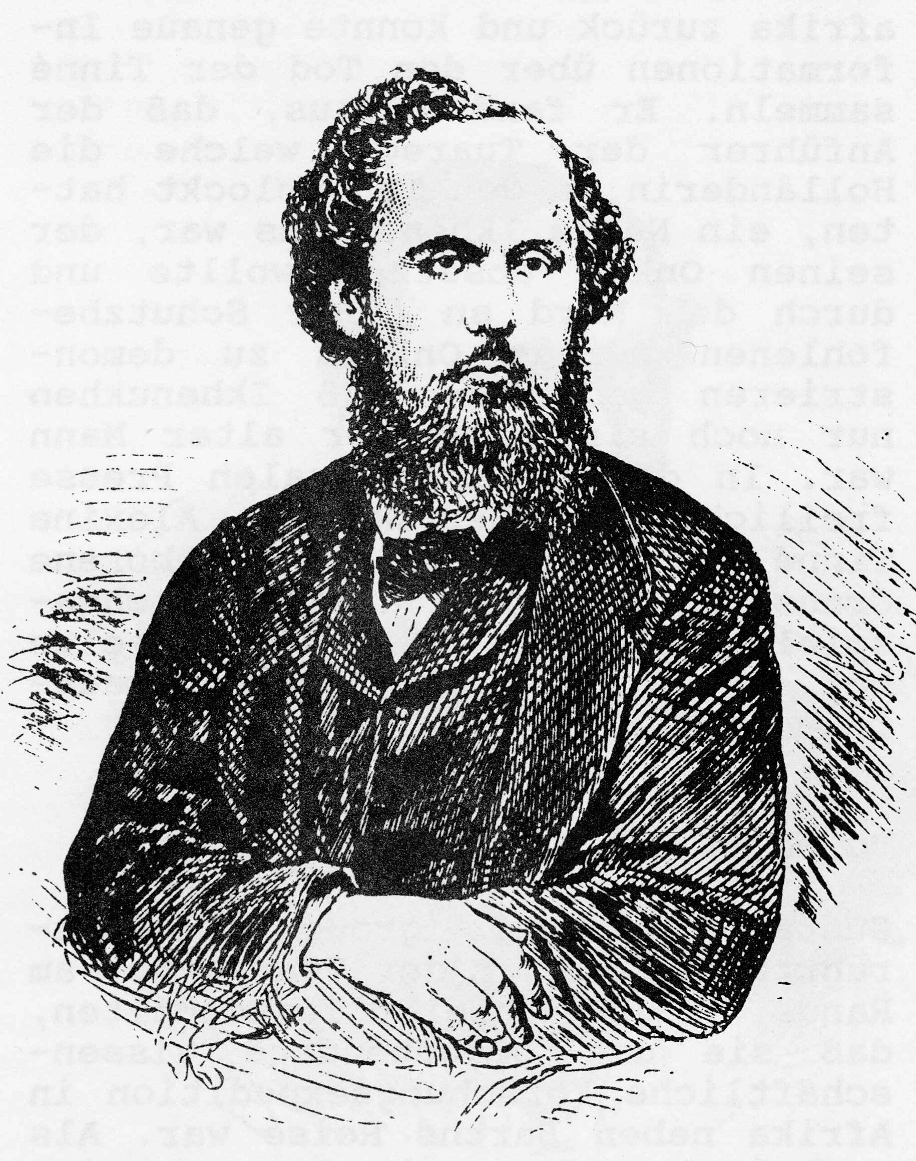 Erwin von Bary, Afrikaforscher